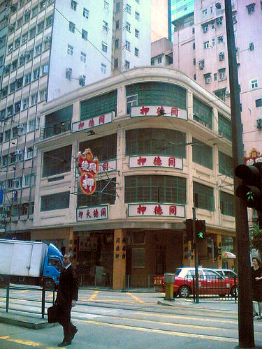 A pawnshop in Wanchai, Hong Kong.